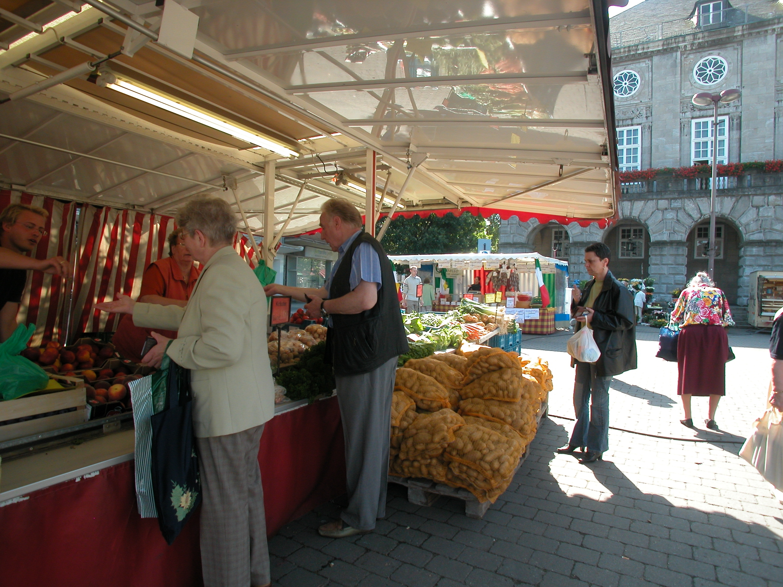 Markt_am_Rathaus